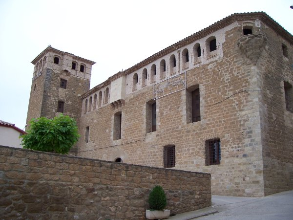 Palau fortificat dels Desvalls, o Castell dels marquesos d'Alfarràs, a Baells (Llitera).